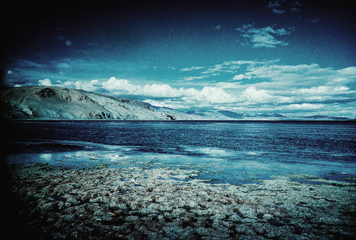 Lake Manasarovar, July 2006